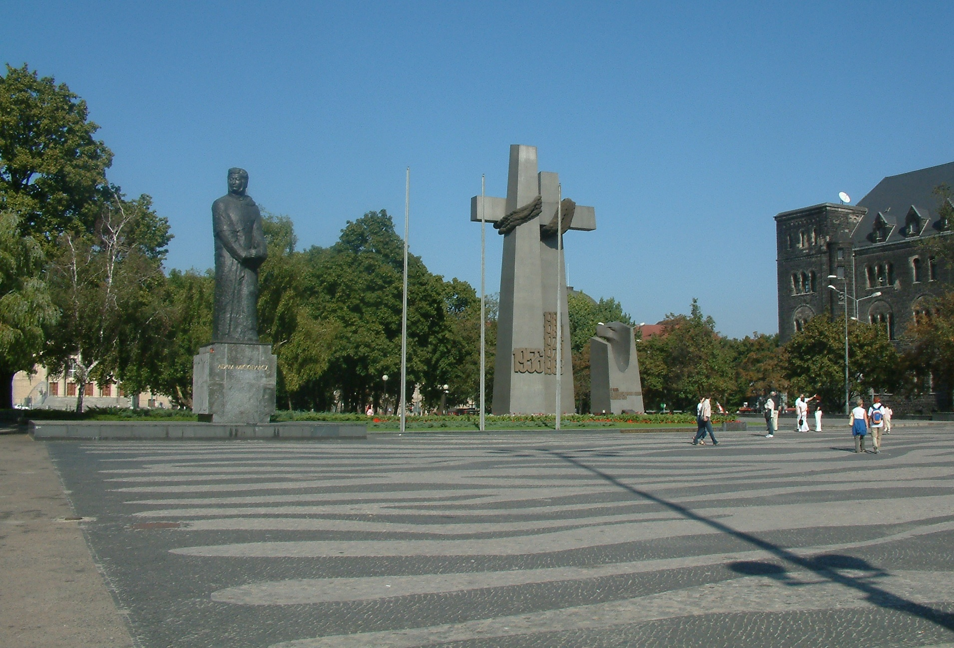 Adam Mickiewicz Sqr. Poznań